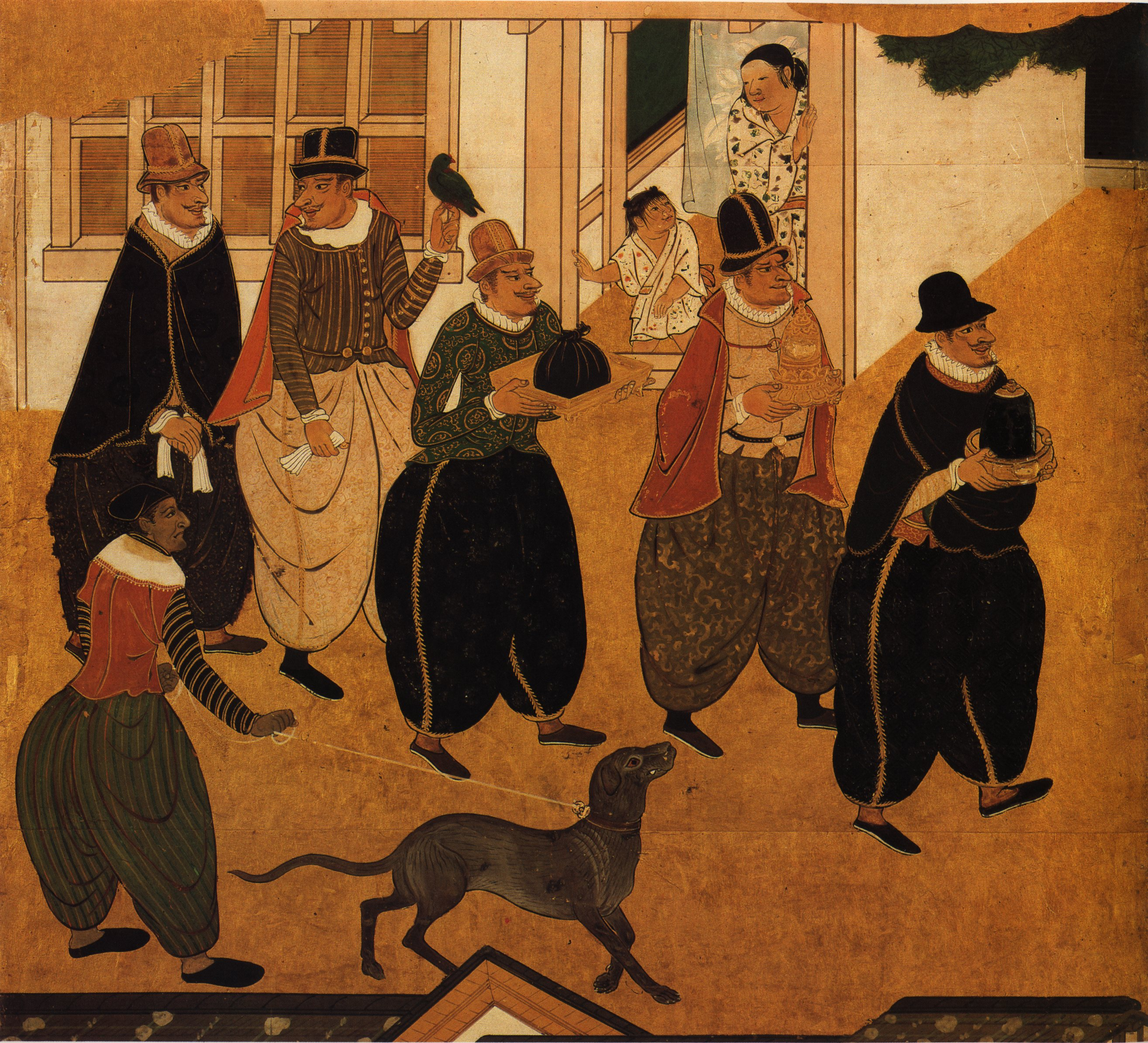 "Namban" artpanelsdetail